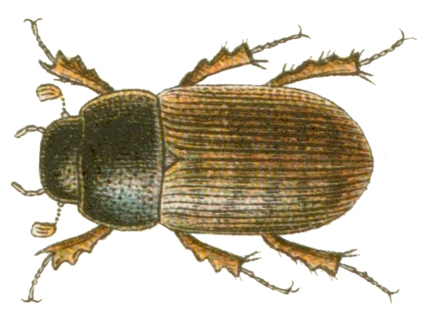 Fauna Germanica. Die Käfer des Deutschen Reiches. I. & II. Band. Farbendrucktafeln von Dr. K.G. Lutz. K.G. Lutz' Verlag, Stuttgart 1908 Heptaulacus testudinarius